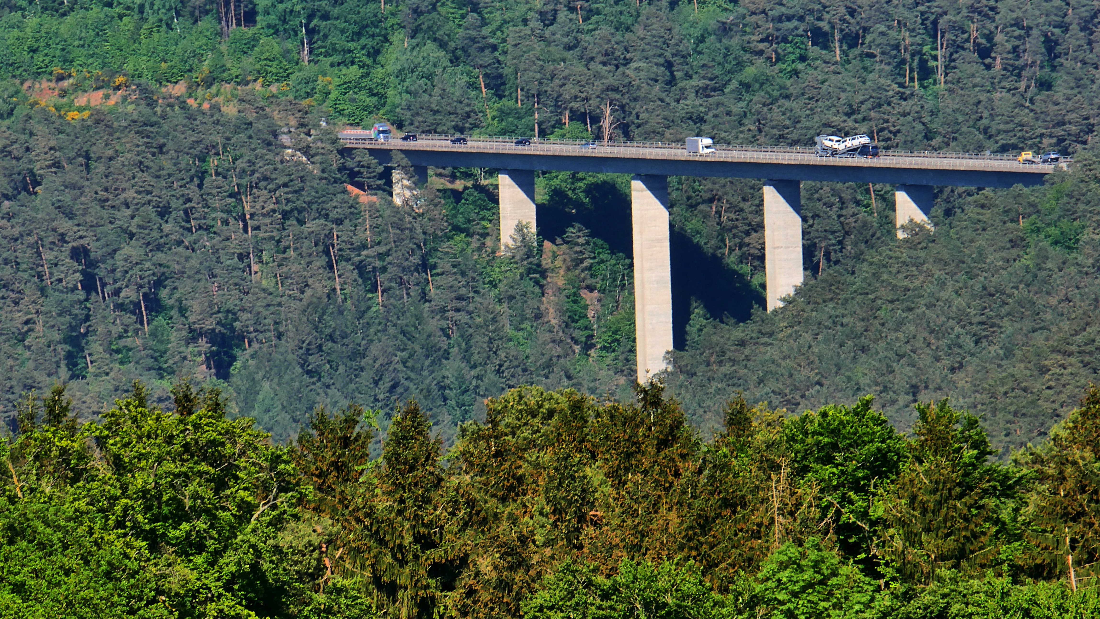 BAB A 64 Biewertalbrücke (bei Trier), vom Kahlenberg aus aufgenommen